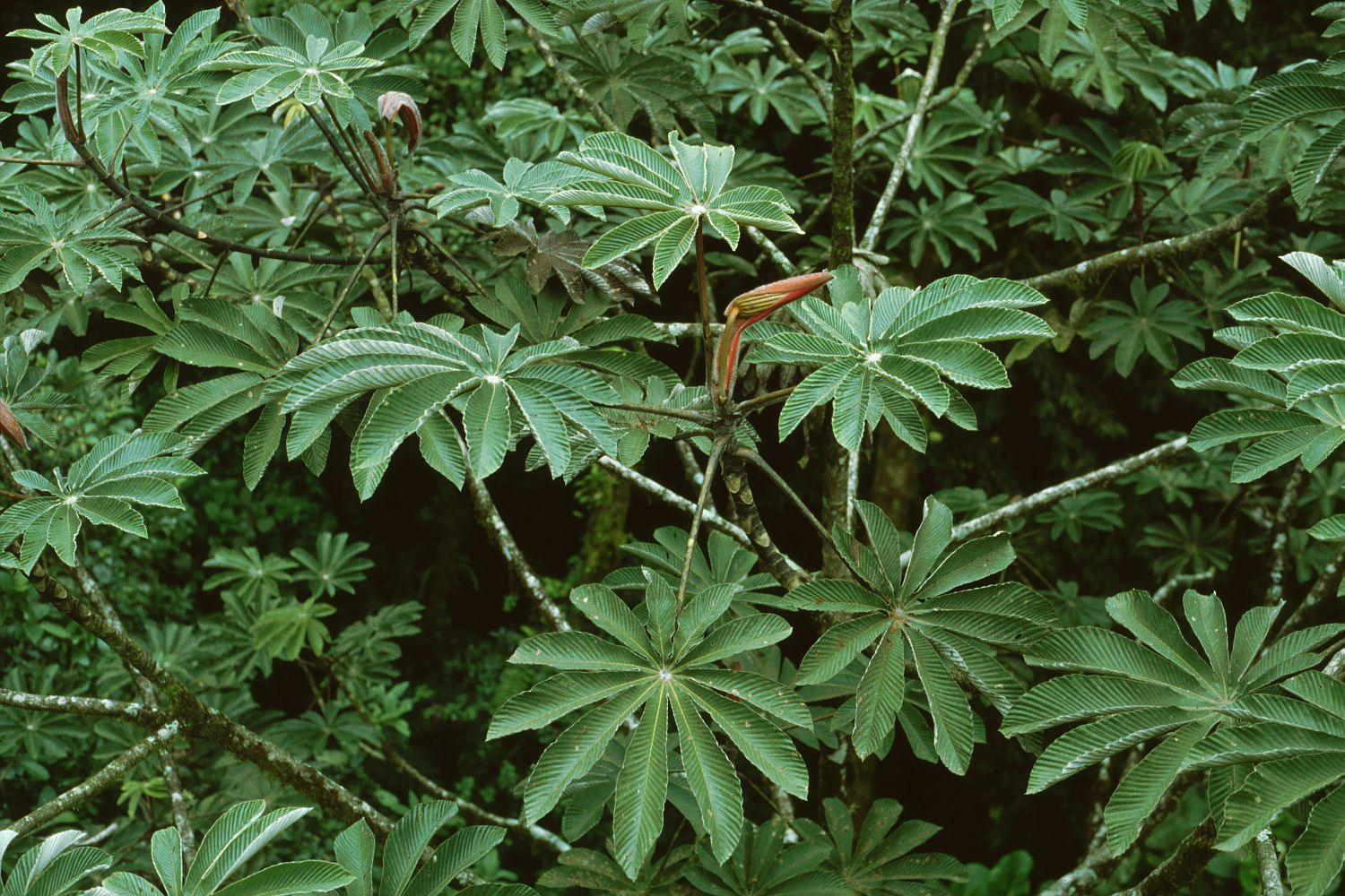 Cecropia angustifolia (= C. polyphlebia), Brennnesselgewächse (Urticaceae) – Costa Rica: Prov. Puntarenas, Cordillera de Tilarán, Monteverde, "Canopy Tour".